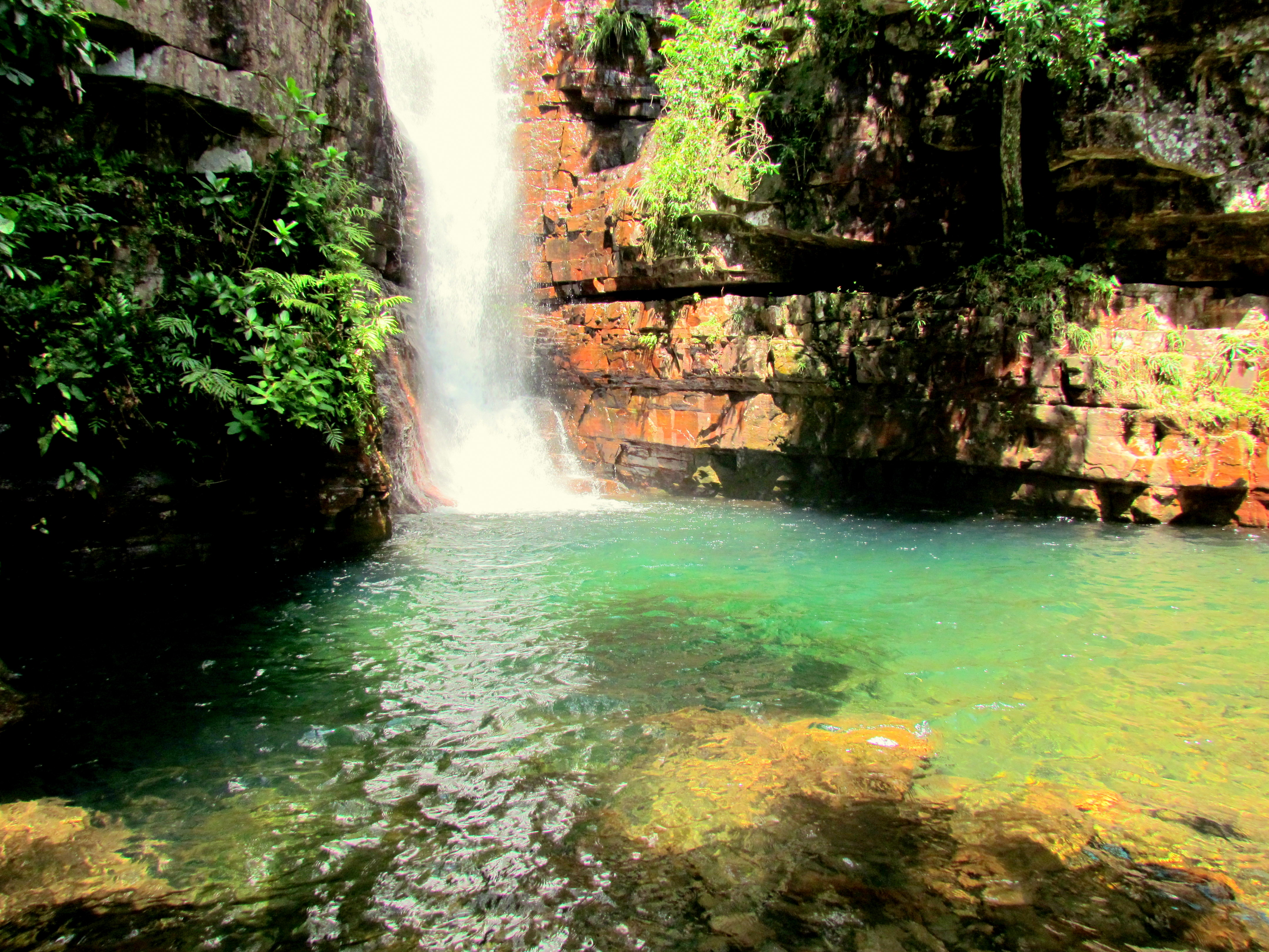 Parte baixa do parque.